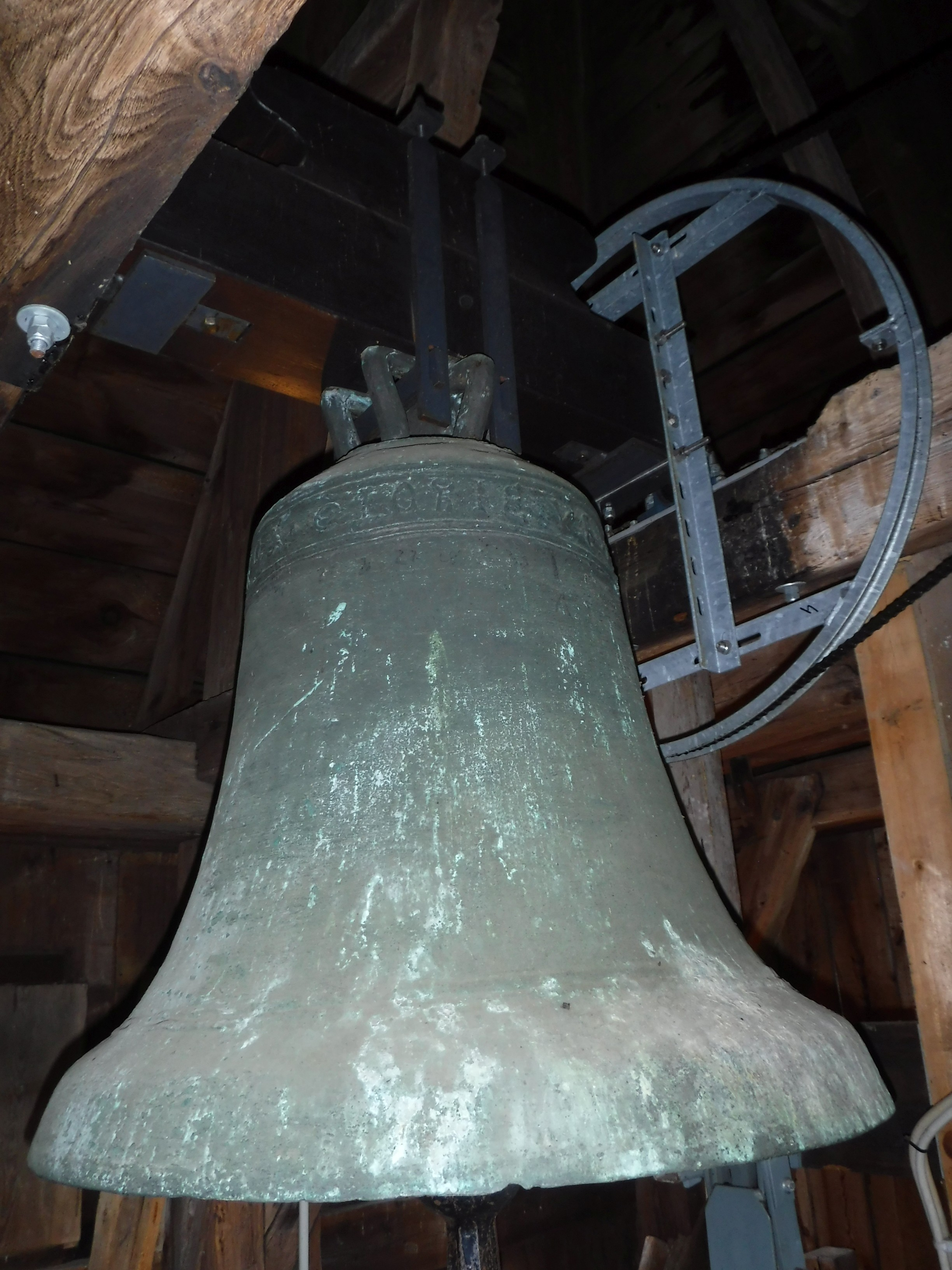 Die mutmaßlich älteste noch läutende Glocke Brandenburgs (gegossen um 1300) in der Dorfkirche Genshagen. Inschrift: O REX GLORIE VENI XPE CUM PACE